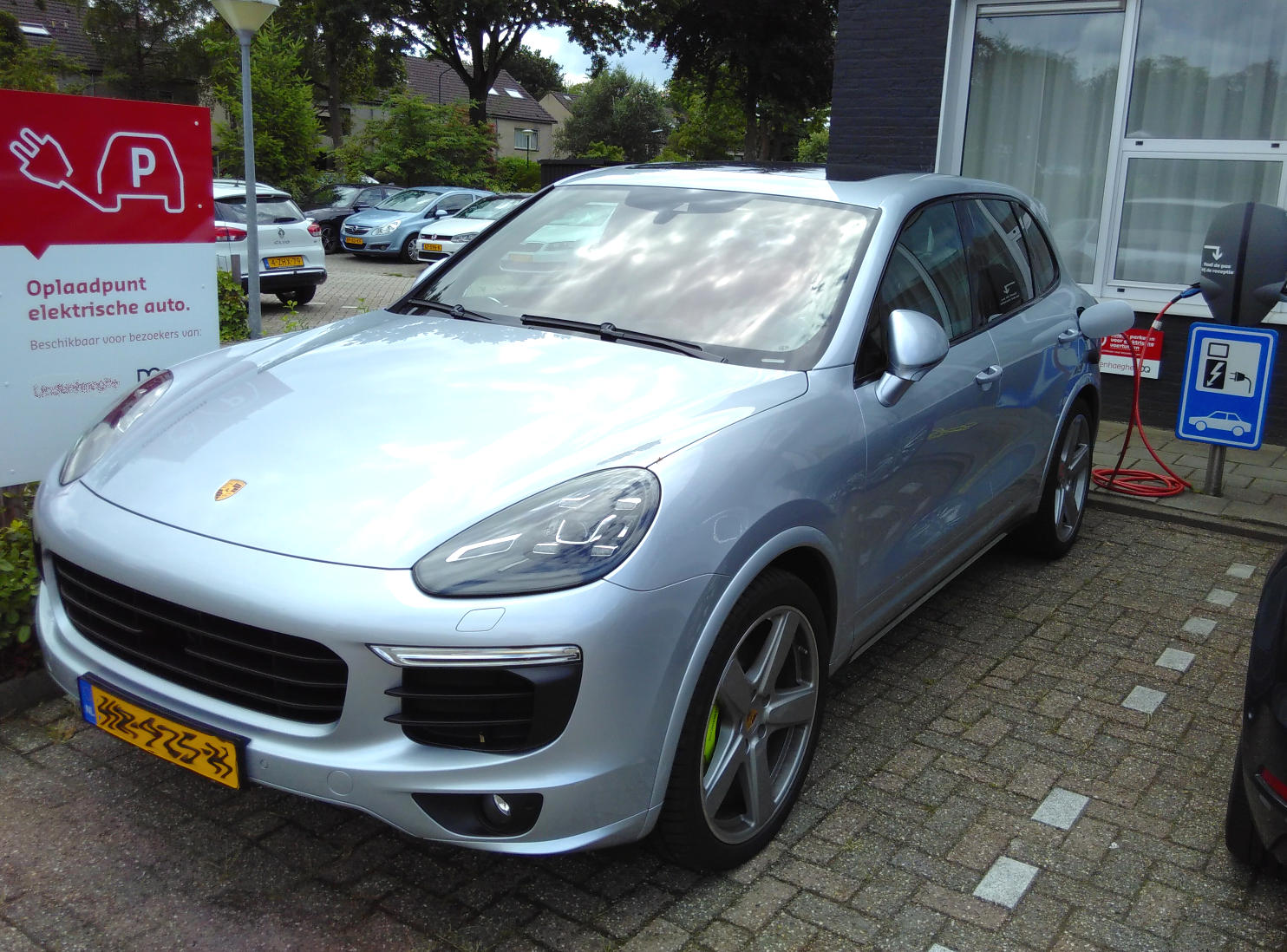 Porsche Cayenne S E-hybrid plugin (2017)